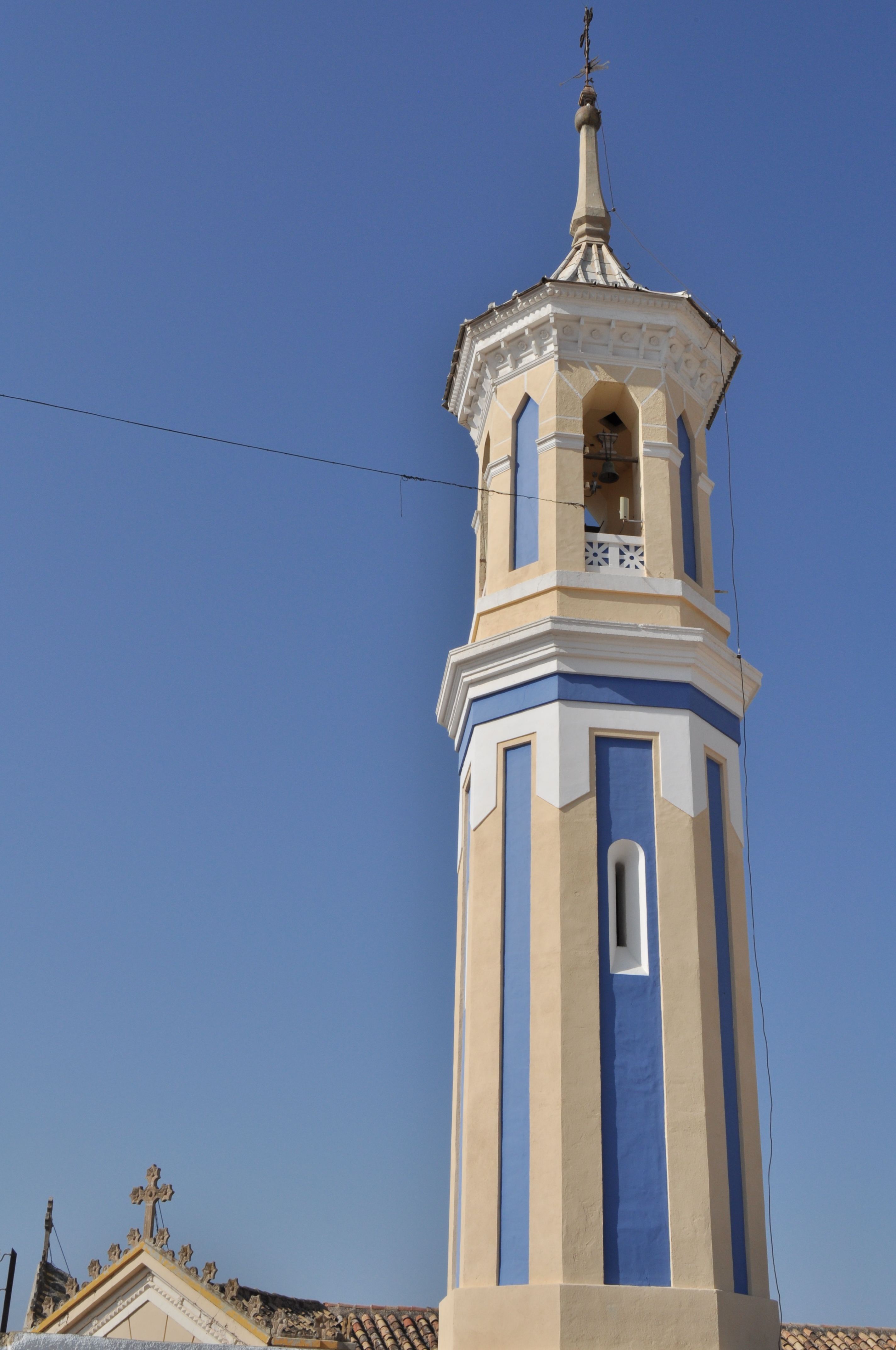 Hellin - 015